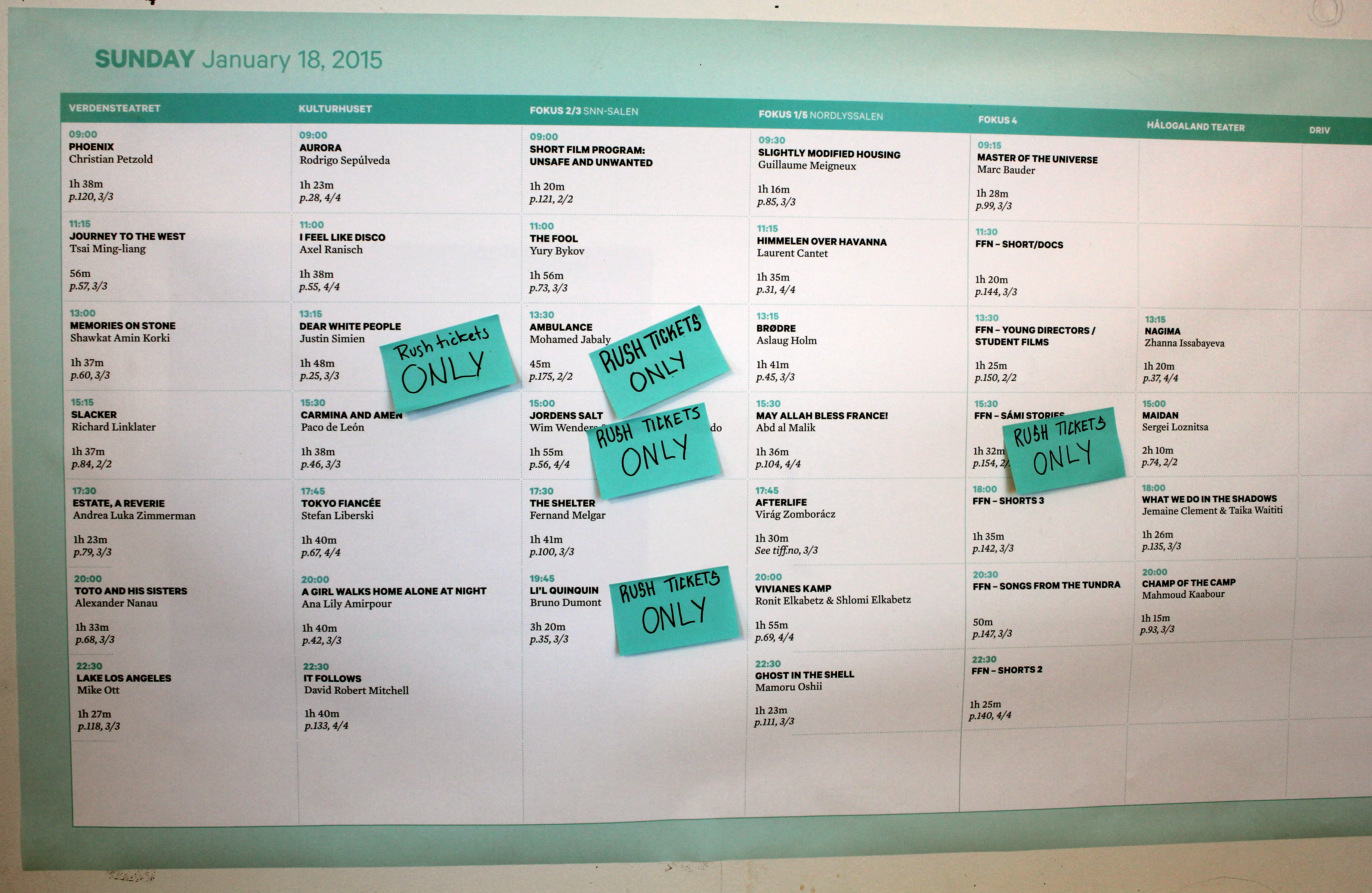 TIFF 2015 program